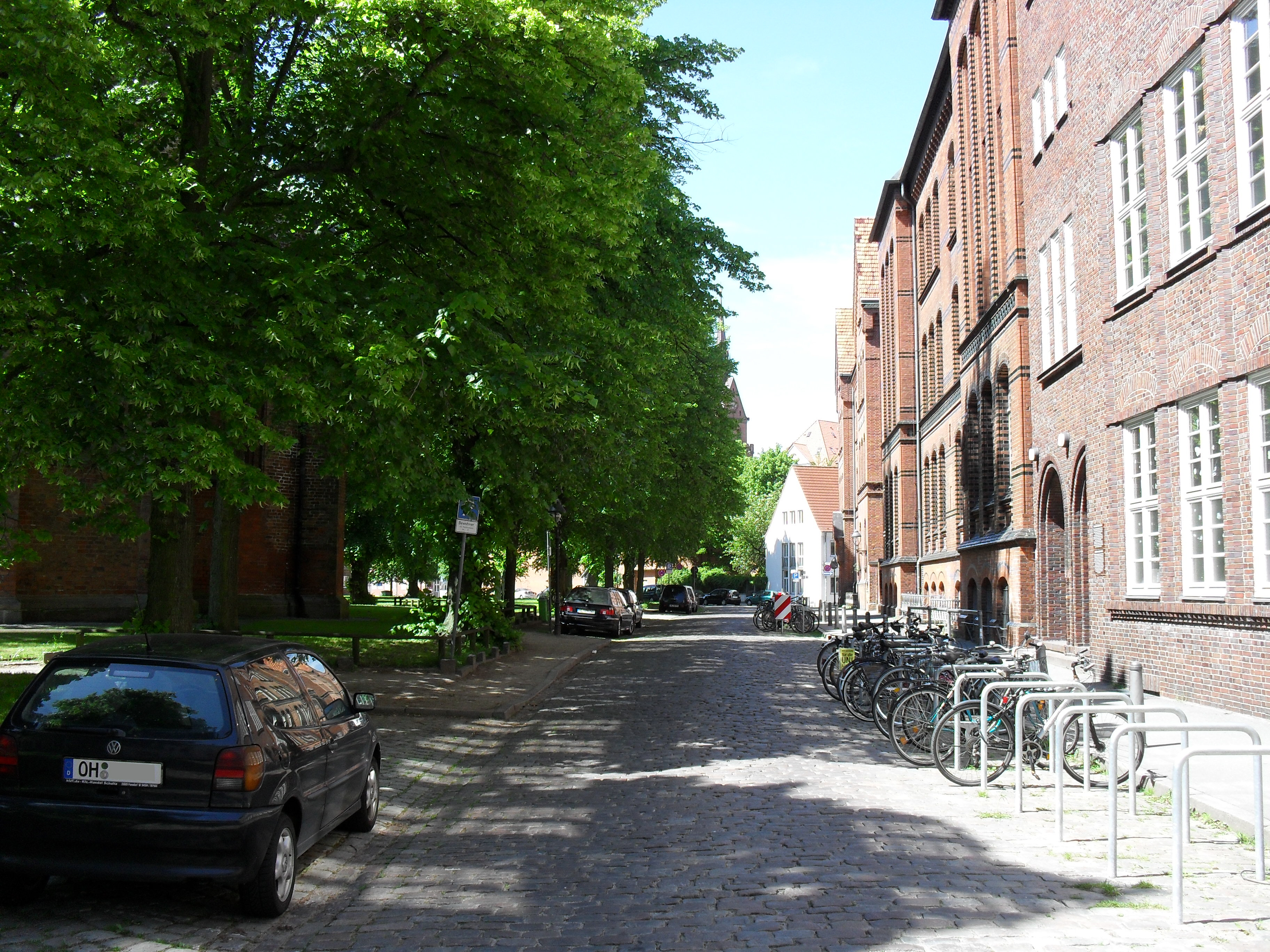 Der Domkirchhof in Lübeck